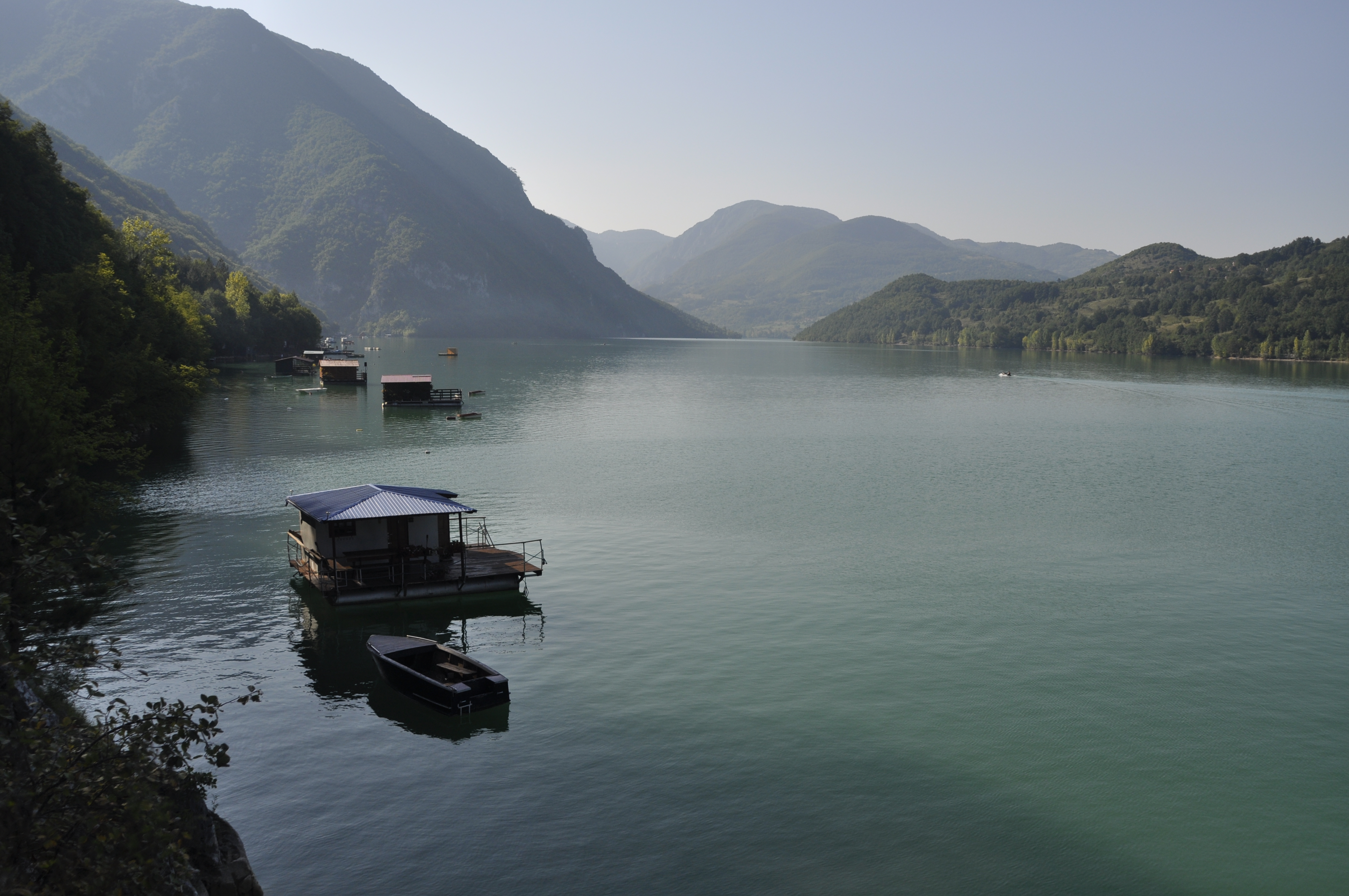 Nacionalni park Tara